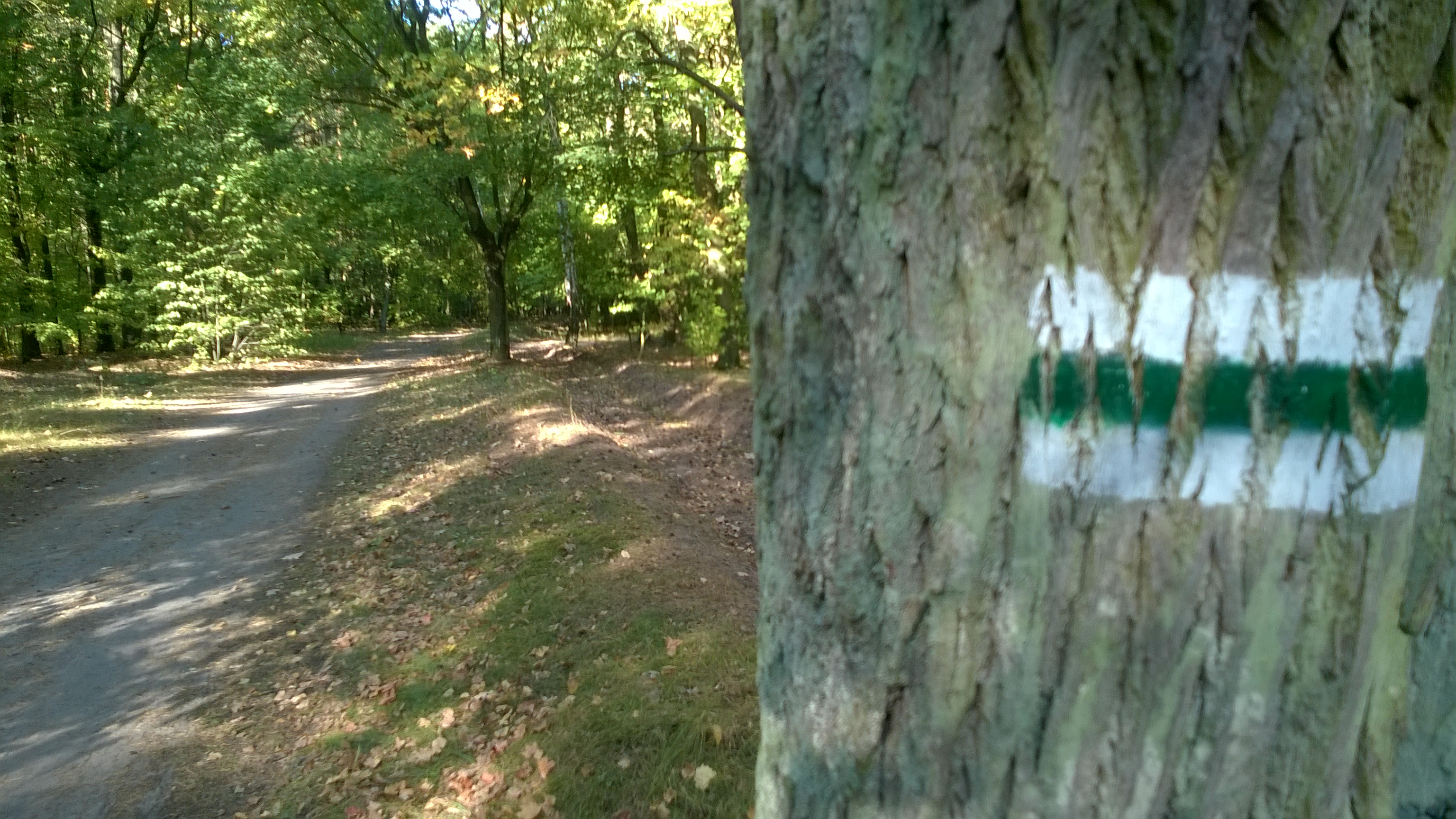 Szlak Martyrologii Narodu Polskiego w Toruniu